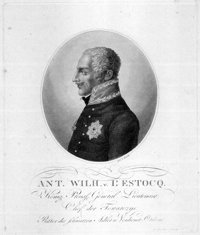 Der preussische Kavallerie-General Anton Wilhelm von L’Estocq (1738-1815)